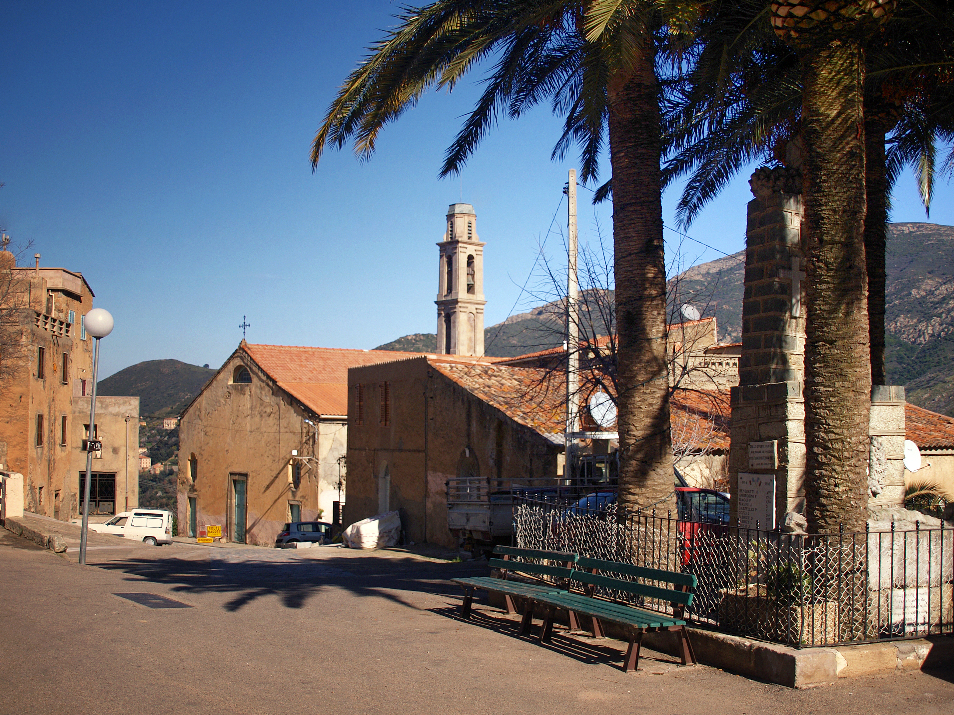 Occhiatana - Place du village, Monuments-aux-morts et Eglise